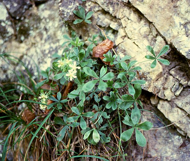 Kalkfelsen-Fingerkraut (Potentilla caulescens), Rosengewächse (Rosaceae) - Österreich/Austria/Autriche: Niederösterreich, Erlauftal E Gaming, Vordere Tormäuer, Toter Mann